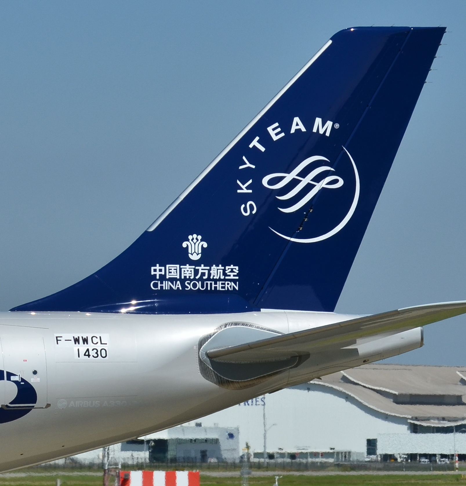 Photo prise à l'aéroport de Toulouse-Blagnac (LFBO) en France. Picture take at Toulouse-Blagnac Airport (LFBO) in France.